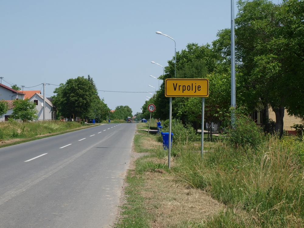 Ulaz u selo Vrpolje, Brodsko-posavska županija.